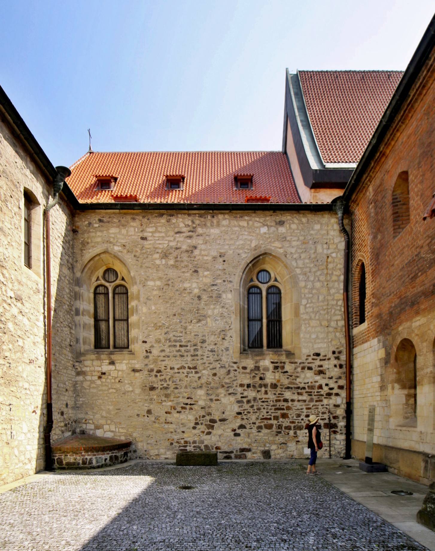 Anežský klášter